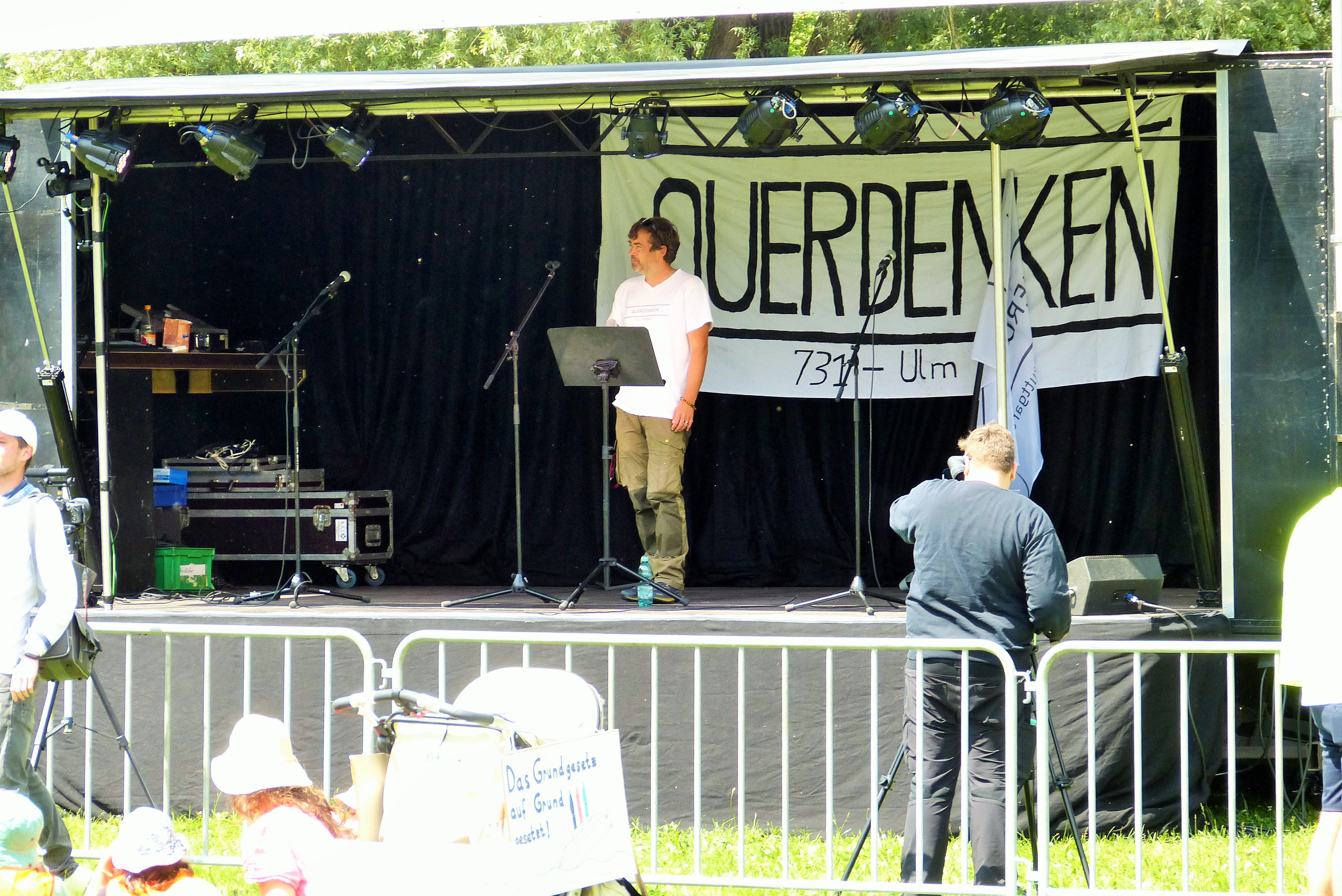 Michael Ballweg in Ulm (...die Menschen haben einfach Lust auf Wahrheit"); 2020